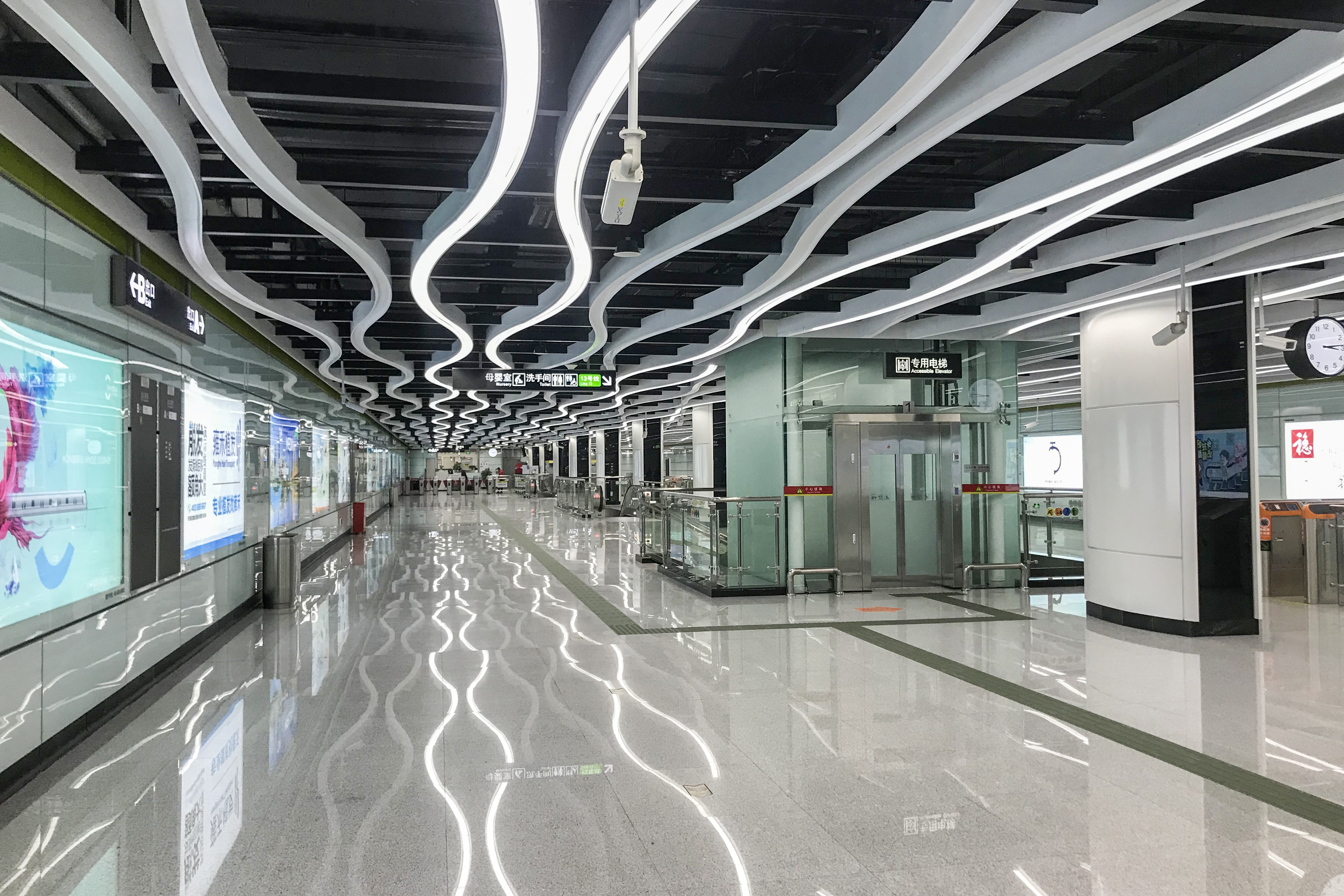 广州地铁官湖站